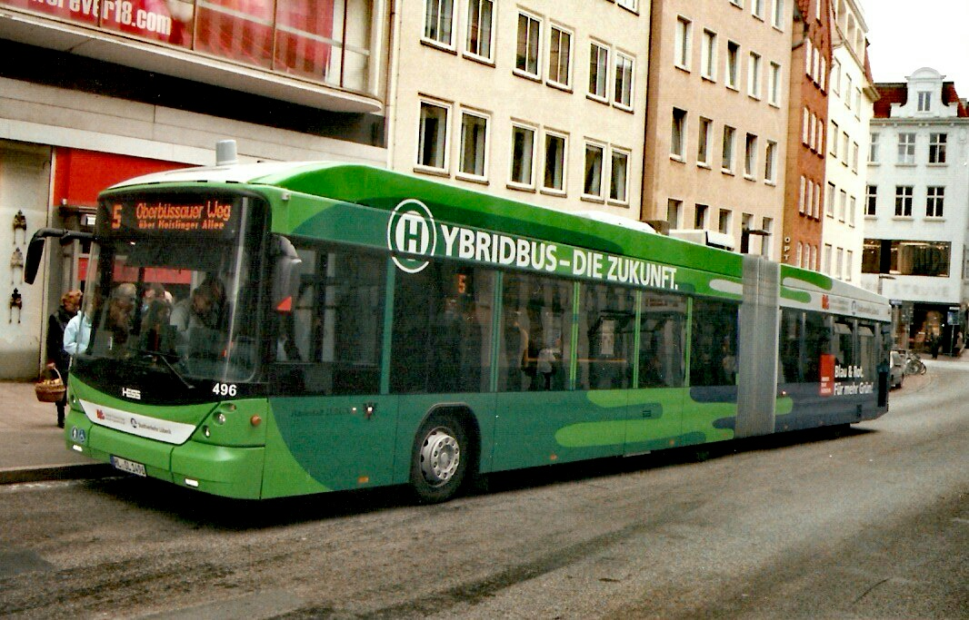 Stadtverkehr Lübeck hat zum IV. Quartal 2011 seinen Fuhrpark um Hybridbusse des schweizer Unternehmens HESS erweitert